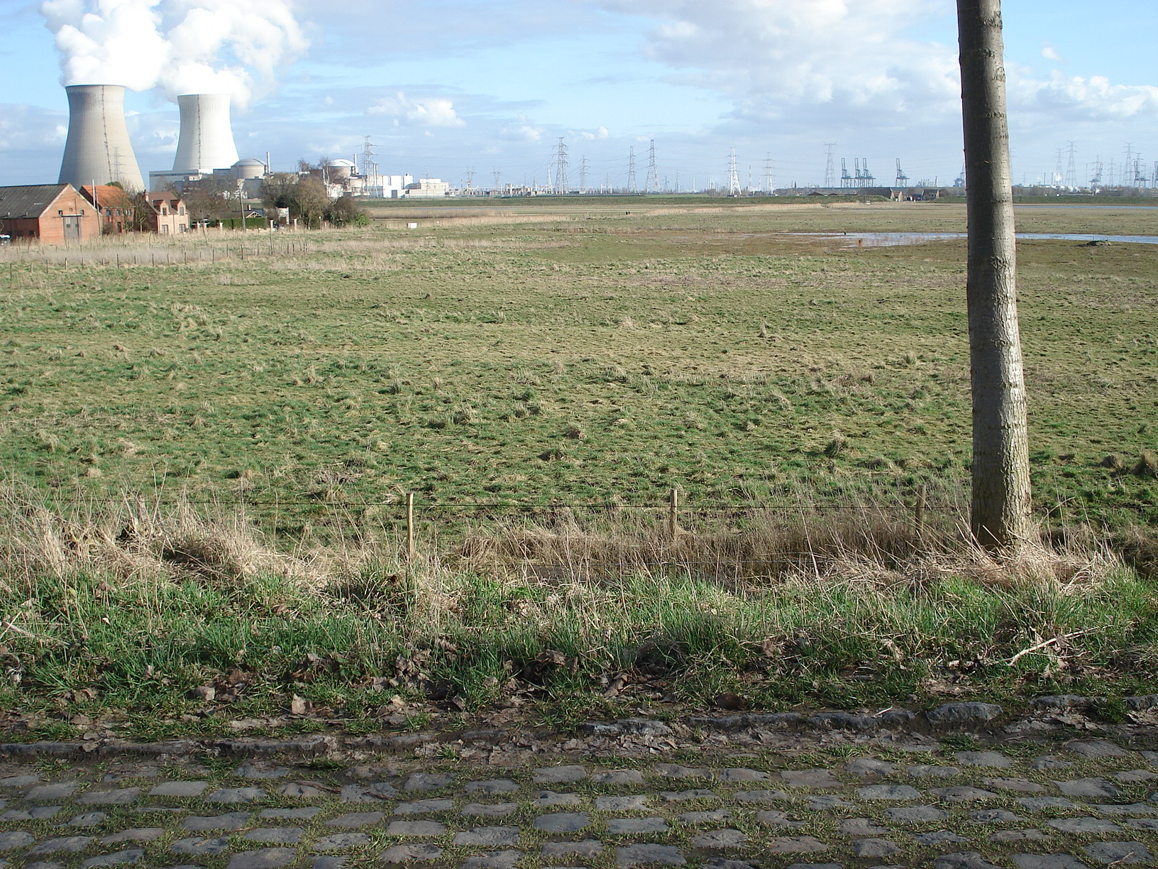 Doelpolder (gem. Beveren, België), gezien vanop polderdijk. links kerncentrale; rechts in de verte haveninstallaties (Deurganckdok en Waaslandhaven). Kerktoren Doel te herkennen tussen de 4 containerkranen links en de twee witte hoogspanningsmasten iets meer naar links.